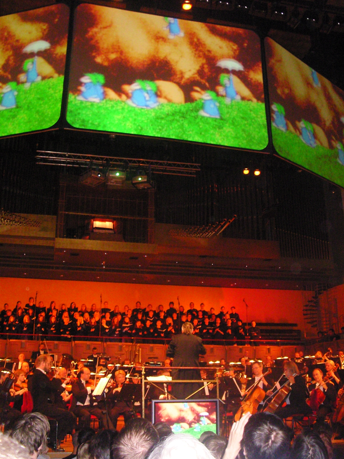 Lemmings